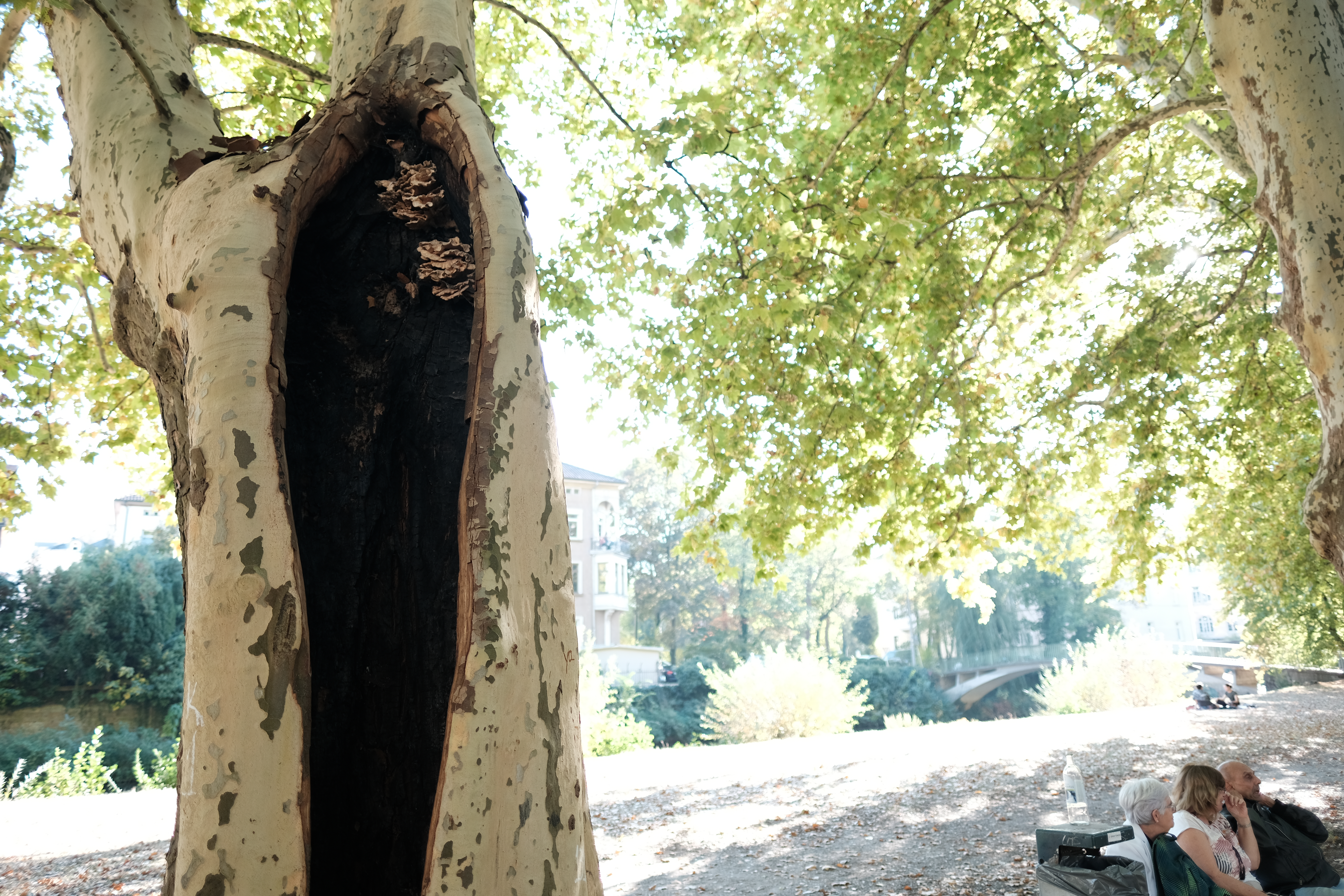 Verbrannte Platane in der Platanenallee in Tübingen